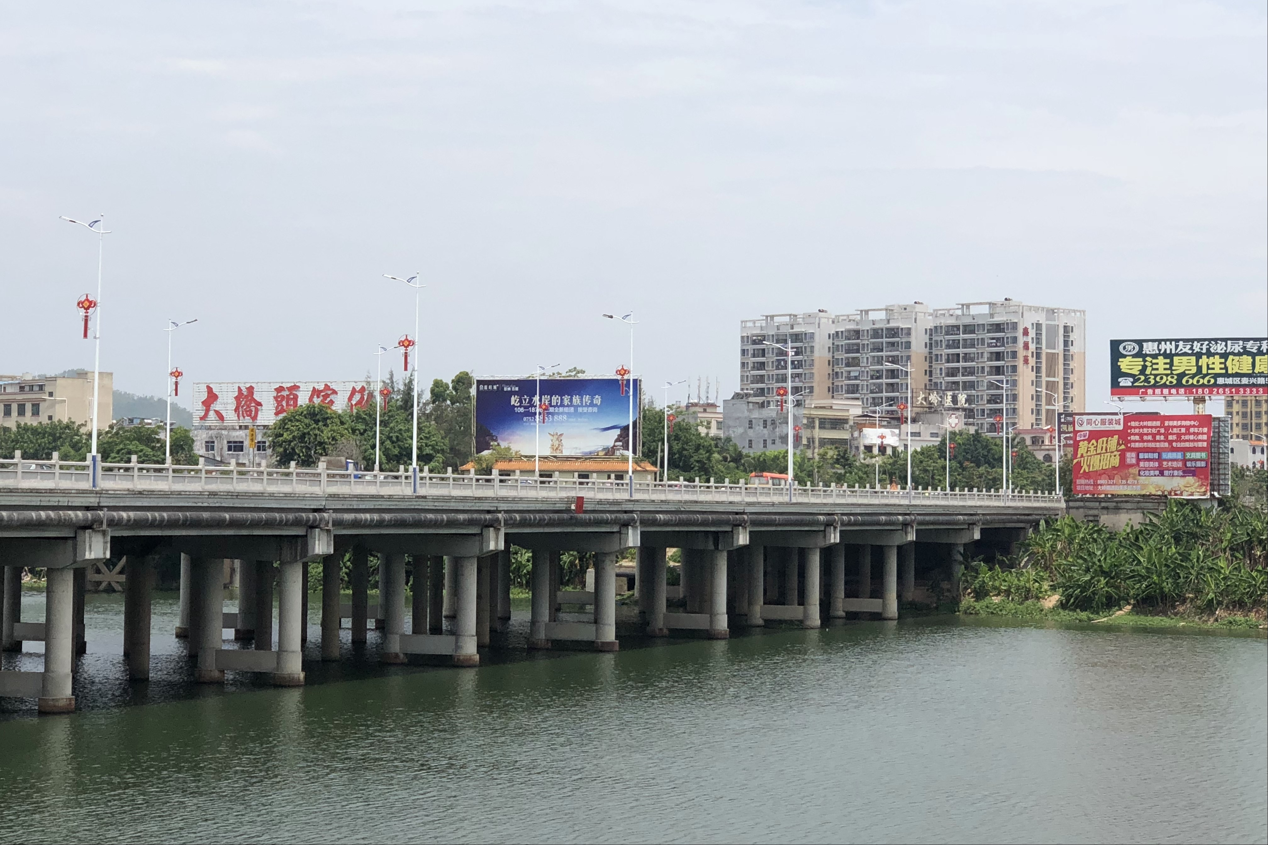 中文（中国大陆）: 平山大桥。